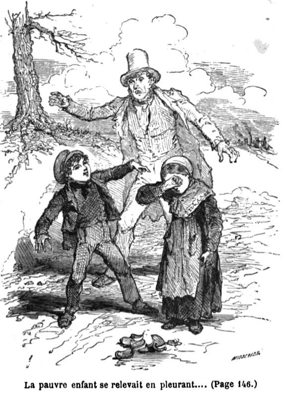 Bertall (1820–1882): Illustration aus "Nouveaux contes pour les enfants" von Sophie de Bawr (1773–1860), Paris 1855, S. 143 ("L’aveugle").